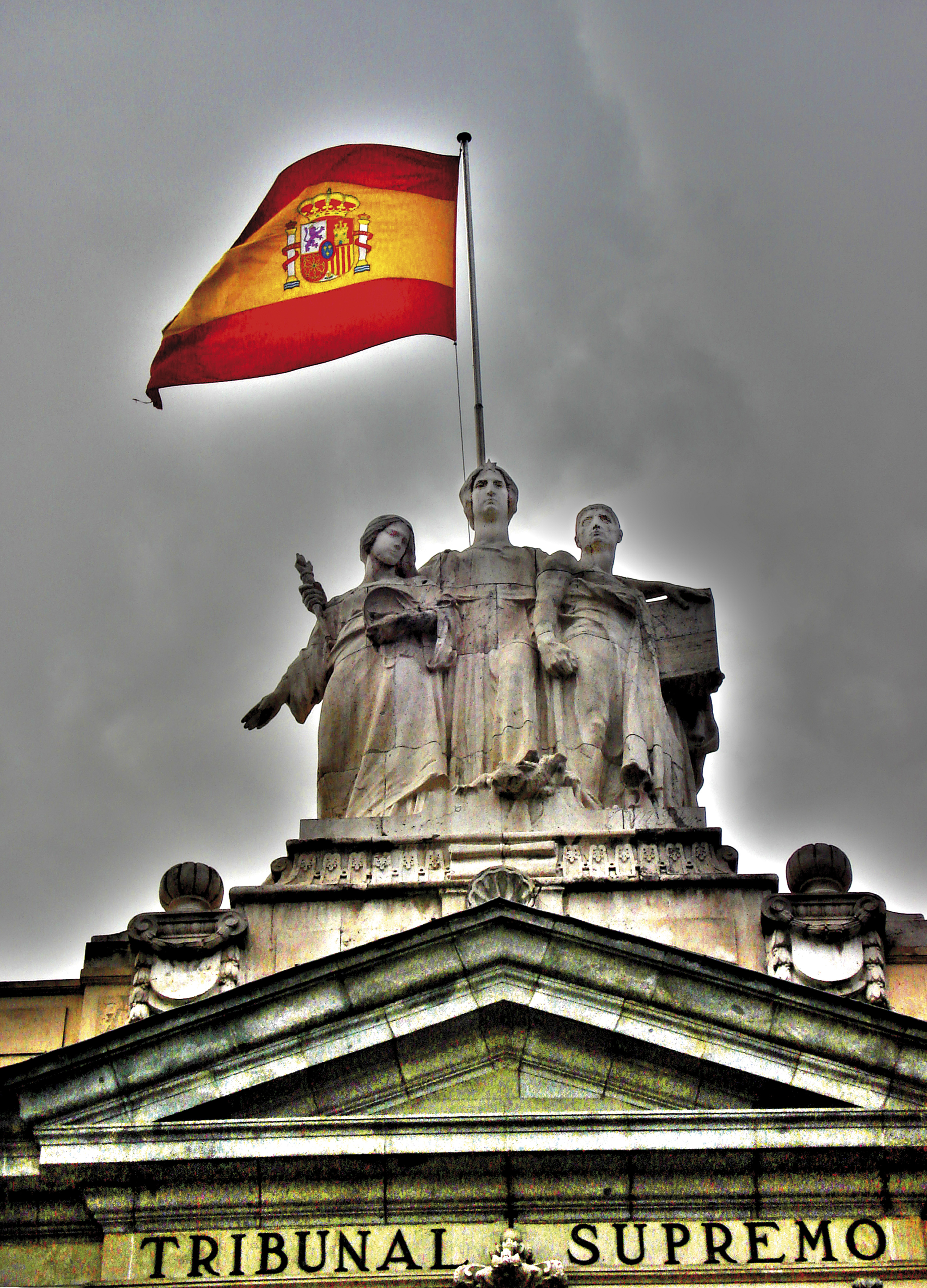 La Ley flanqueada por la Justicia y el Derecho. Grupo escultórico obra de Miguel Blay. Se halla sobre la puerta principal del Alto Tribunal, en la Plaza de la Villa de París, s/n, en Madrid.